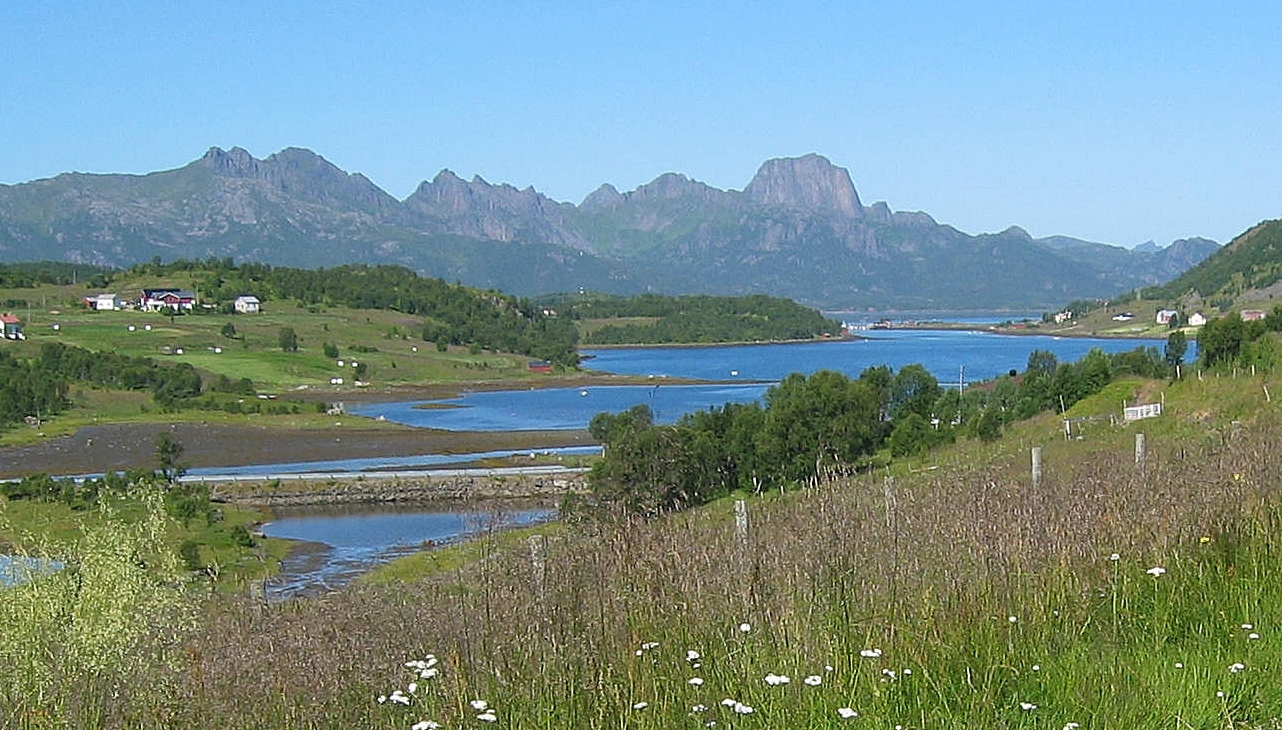 Bildet tatt fra Oshaugen i Eidsfjorden 19. juli 2003.